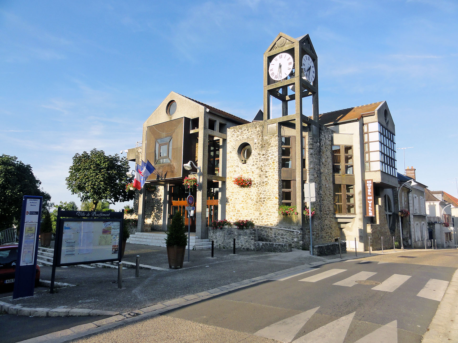 Mairie de Bouffémont, Val-d'Oise, France.